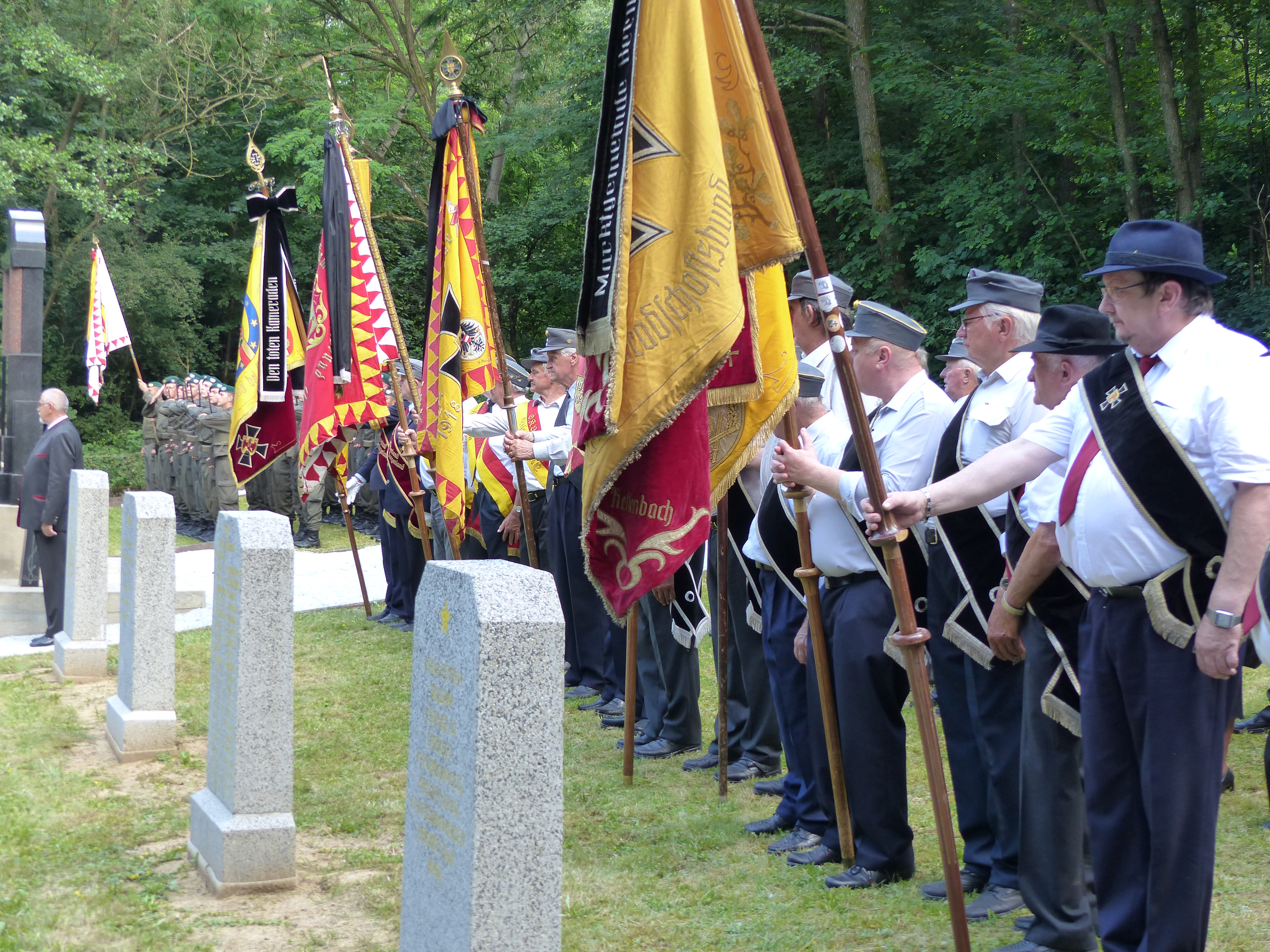 Begräbnis sowjetischer Soldaten 24. Juni 2016 - Vertreter des Kameradschaftsbundes